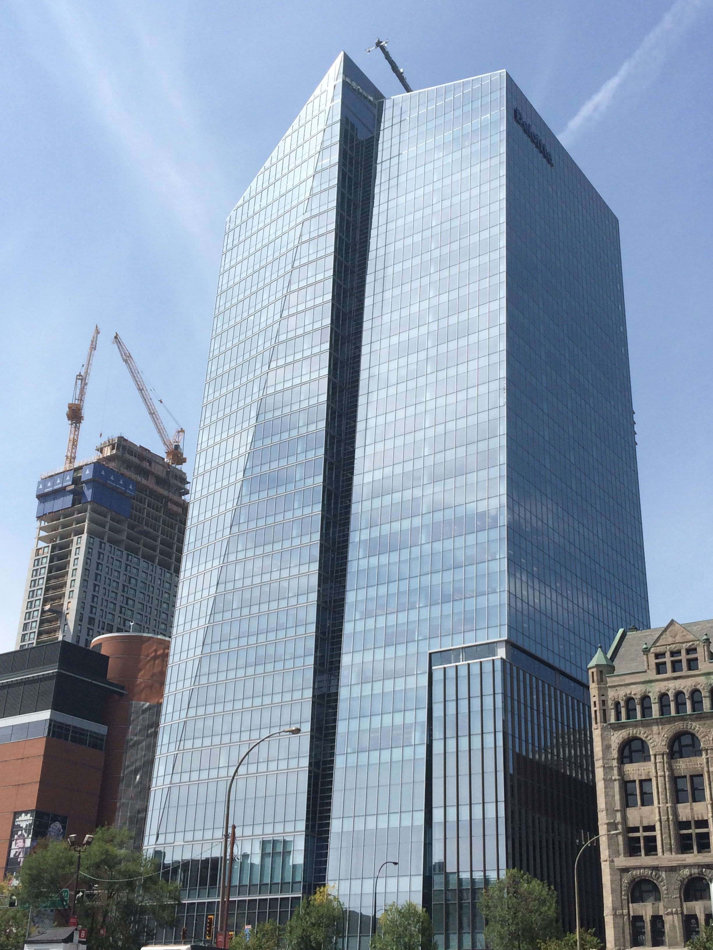 Deloitte